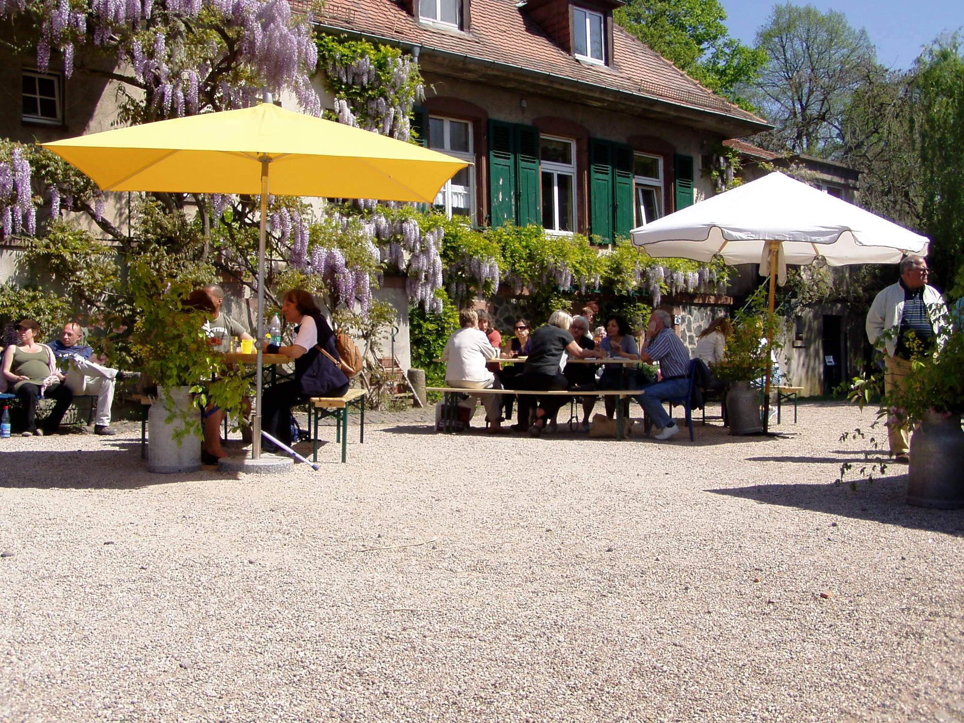 Sonntagscafé im Darmstädter Hofgut Oberfeld 2007